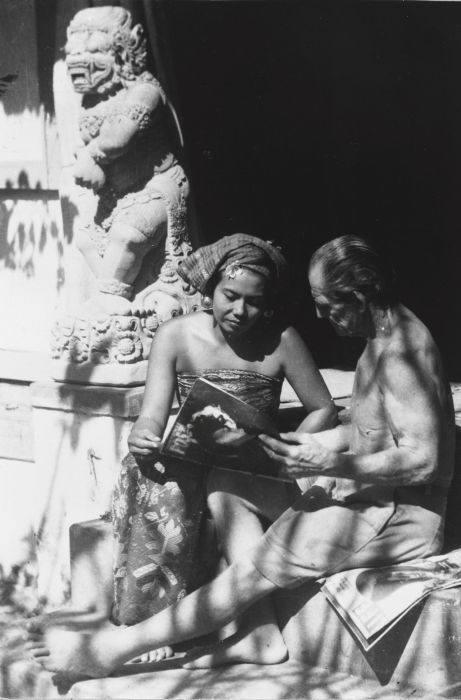 Negatief. De Belgische kunstenaar Le Mayeur heeft onder meer jarenlang op Bali gewerkt en een groot oeuvre nagelaten. Het museum Le Mayeur op Bali is te vinden in het voormalig woonhuis van de Belgische schilder Adrien Jean Le Mayeur de Merpres (1880-1958) en zijn Balinese vrouw Ni Pollok. In 1931 kwam Le Mayeur aan in Bali en ontmoette hij Ni Pollok. Zij was een beroemde danseres en poseerde vaak voor hem. Na zijn dood liet hij huis en werk na aan Ni Pollok. Toen Ni Pollok in 1985 stierf werd het huis Museum Le Mayeur. In het museum is een groot deel van het oeuvre van de schilder te bezichtigen. De Belgische kunstschilder Le Mayeur de Merprès met zijn vrouw en model Ni Pollok